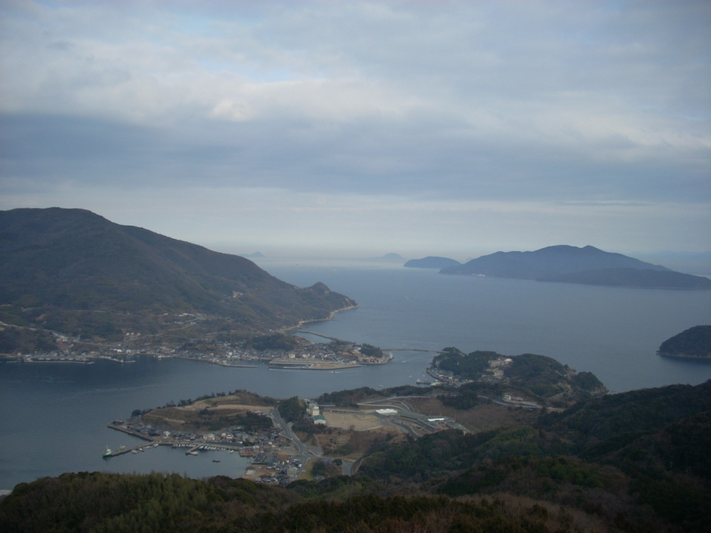 上関町上盛山からの室津の展望。手前が長島、奥が室津。